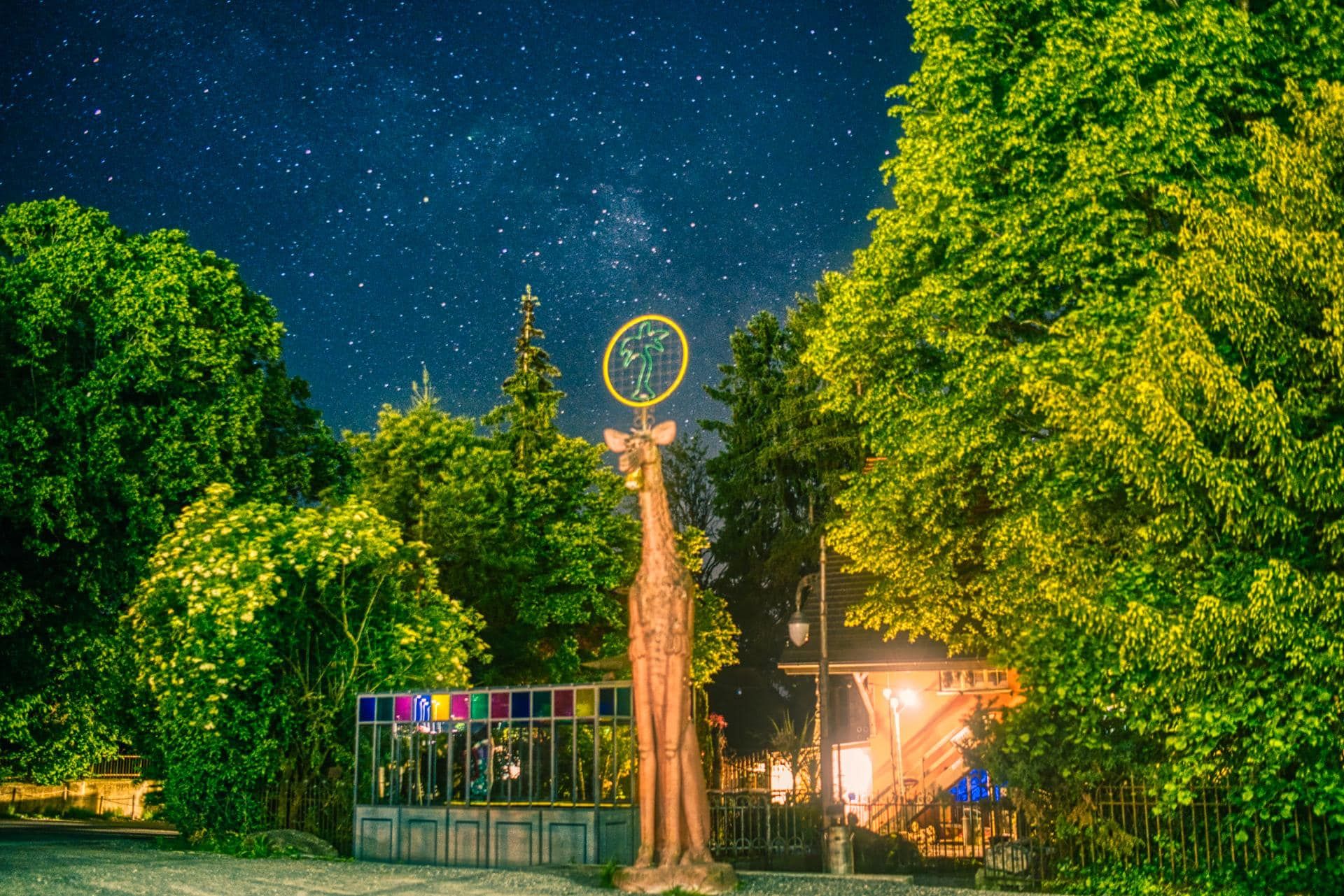 Blick auf den Pavillon im verwunschenen Garten der Mühle Hunziken